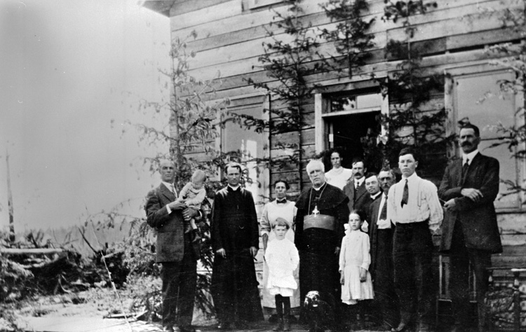 Mgr Elie-Anicet Latulipe